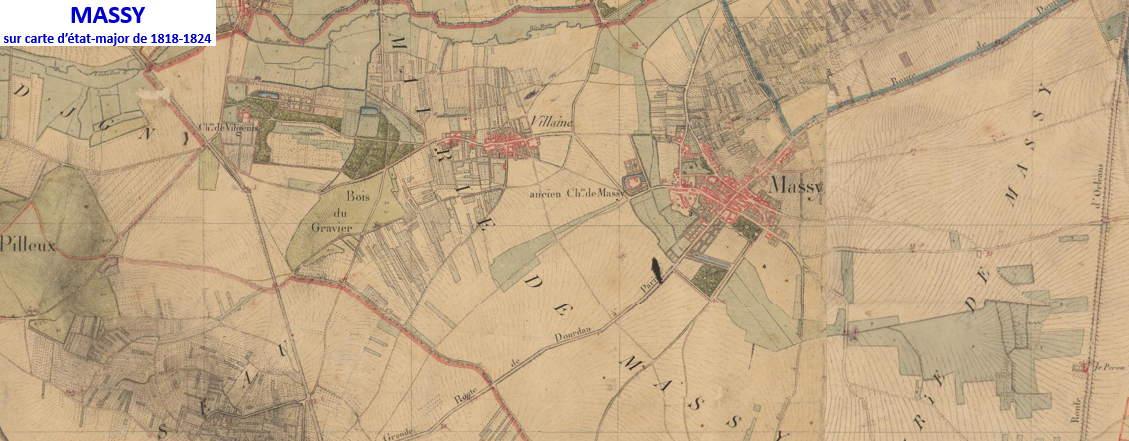 Massy sur carte d'état-major de 1818-1824 (IGN)